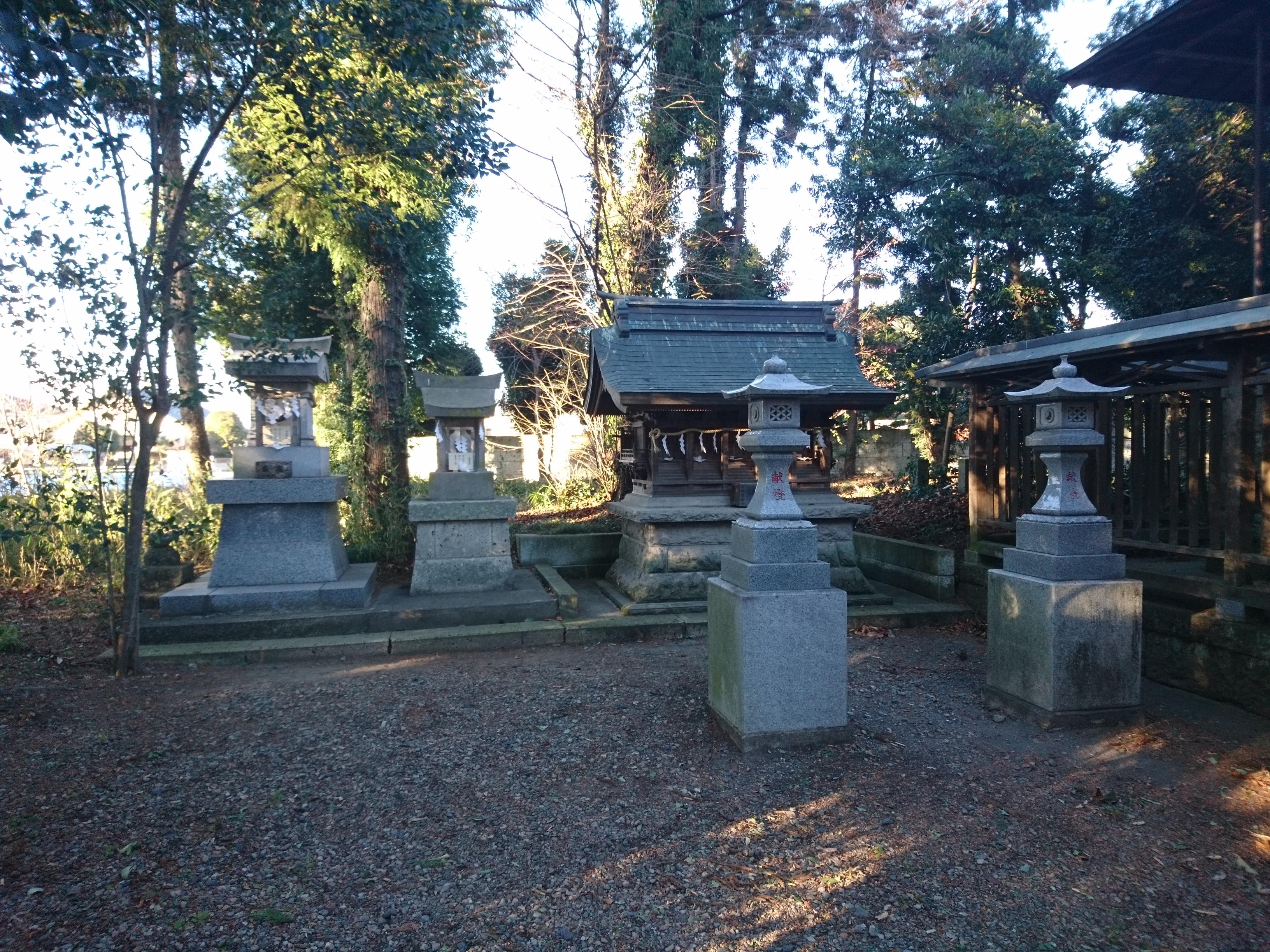 栃木県栃木市にある平柳星宮神社の境内社、白山神社（左二社）と相殿五社（大国社・稲荷社・神明社・水神社・山神社）。